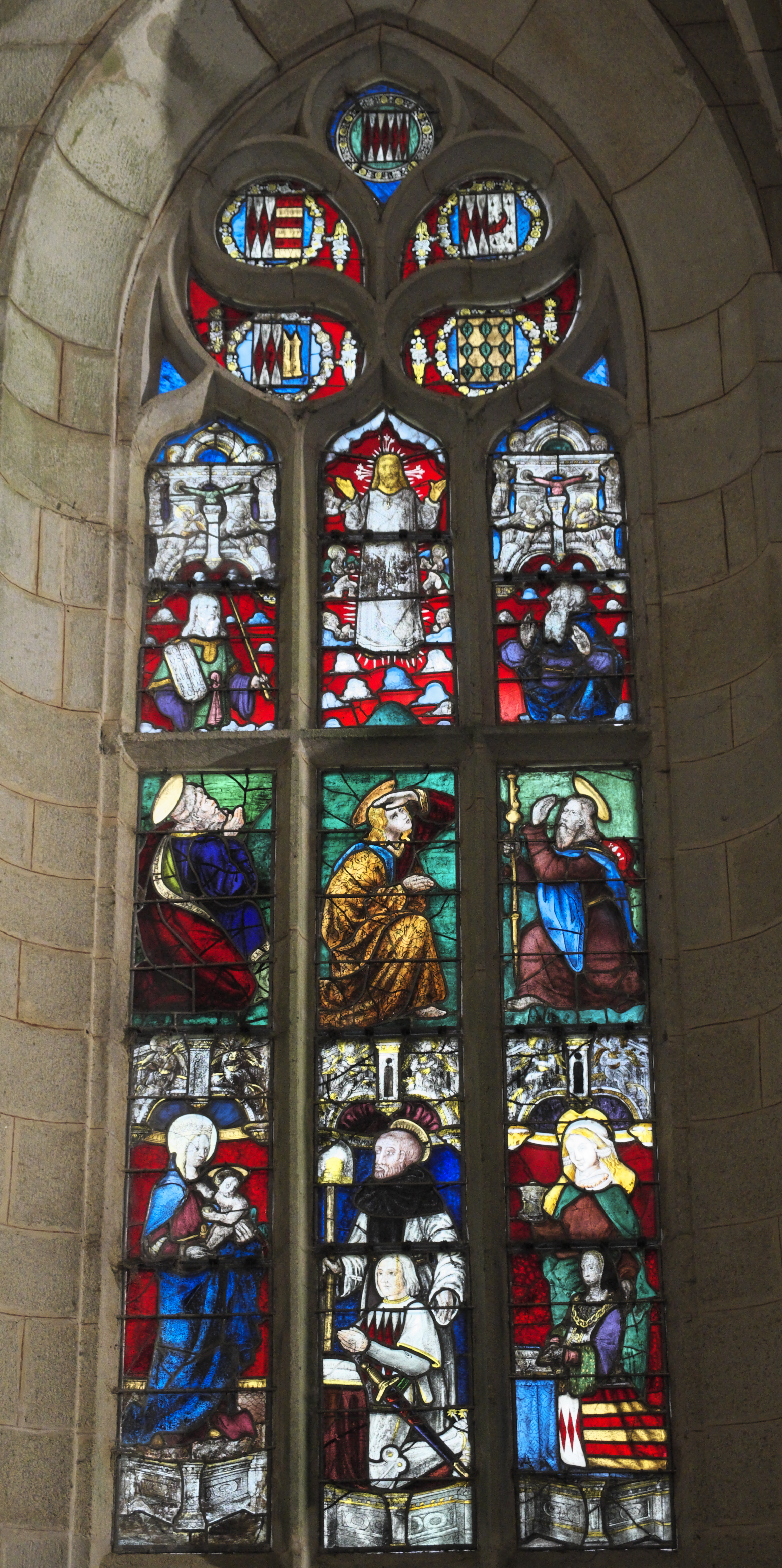 Kapelle Sainte-Barbe in Le Faouët im Département Morbihan (Region Bretagne/Frankreich), Bleiglasfenster von 1510 bis 1515; Darstellung: Verklärung des Herrn